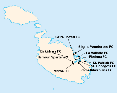 Répartition des clubs en First Division Maltaise 1972-1973.